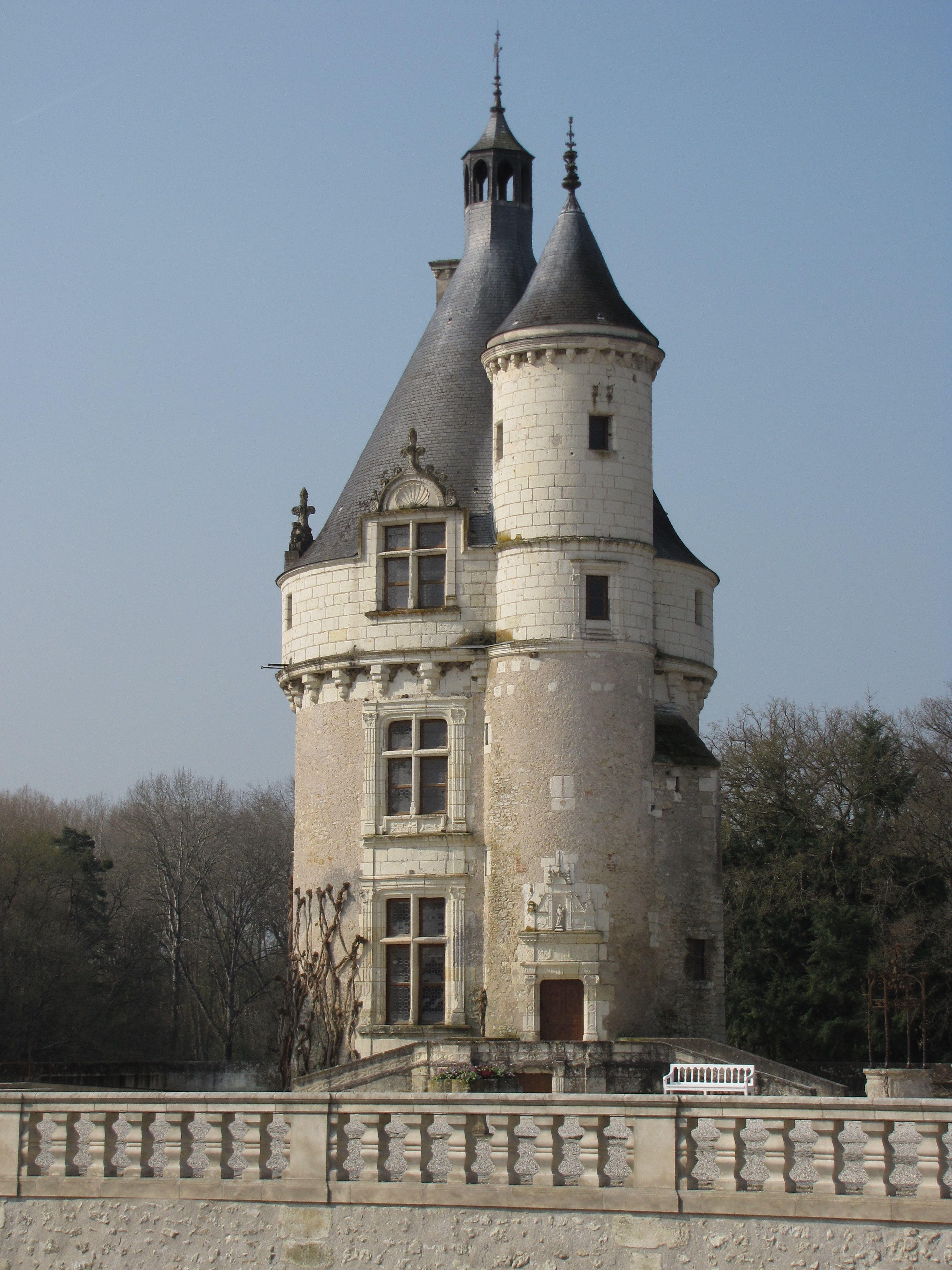 Tour des Marques Châteaux de Chenonceau